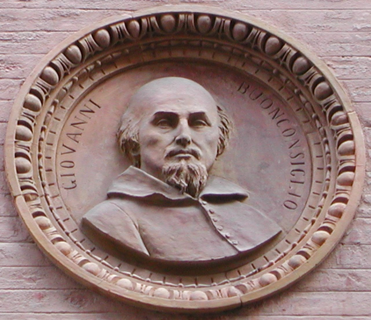 Ritratto di Giovanni Buonconsiglio (pittore rinascimentale di Vicenza) al Palazzo Thiene a Vicenza